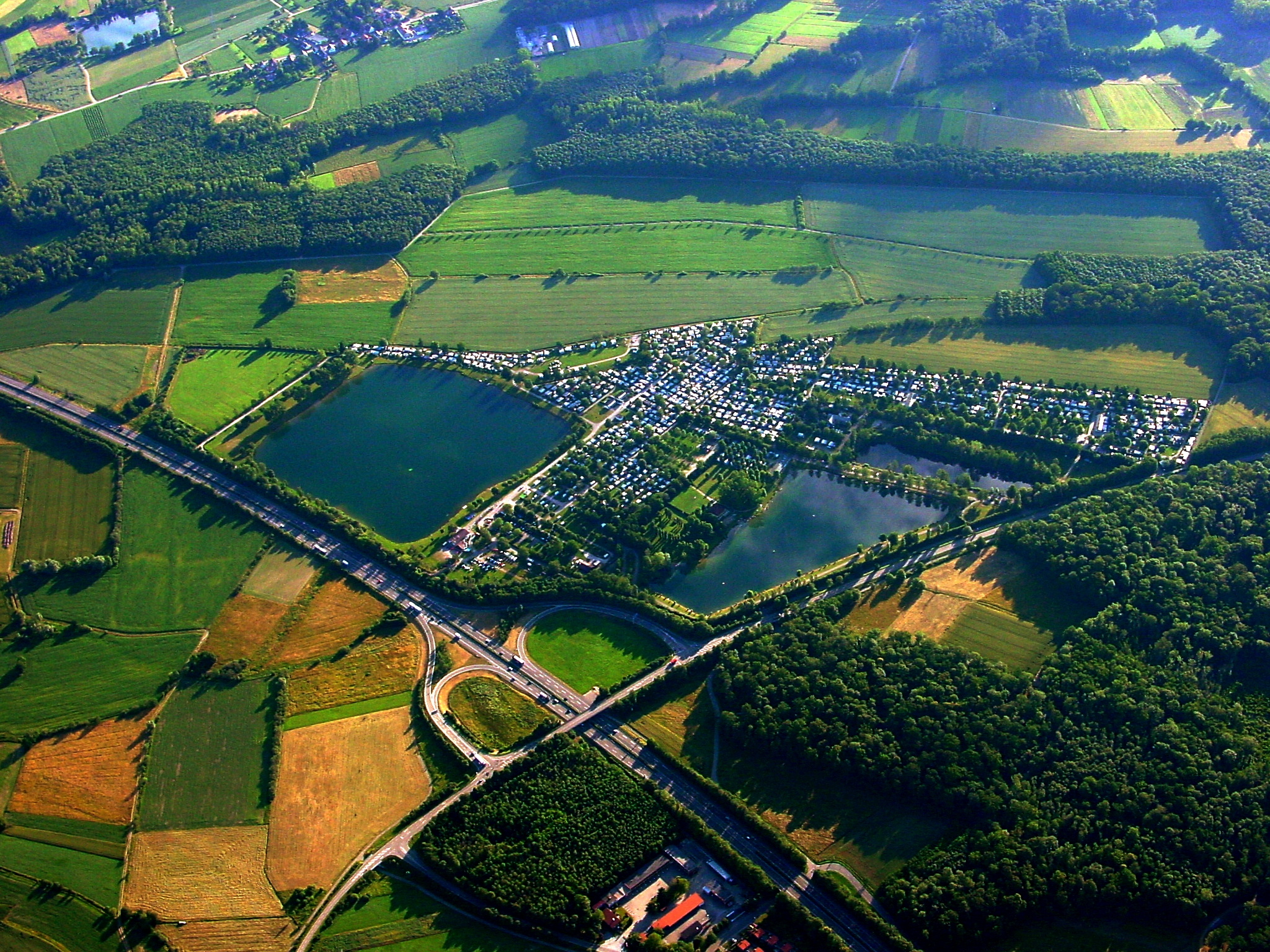 Das Luftbild zeigt den Tunisee (links) und den Silbersee (Breisgausee) an der Autobahnausfahrt Freiburg-Nord